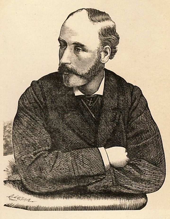 Thomas Davidson Portrait